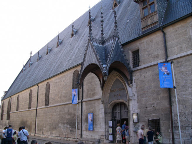 Eingang zum Hôtel-Dieu in Beaune